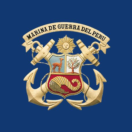 Escudo MGP